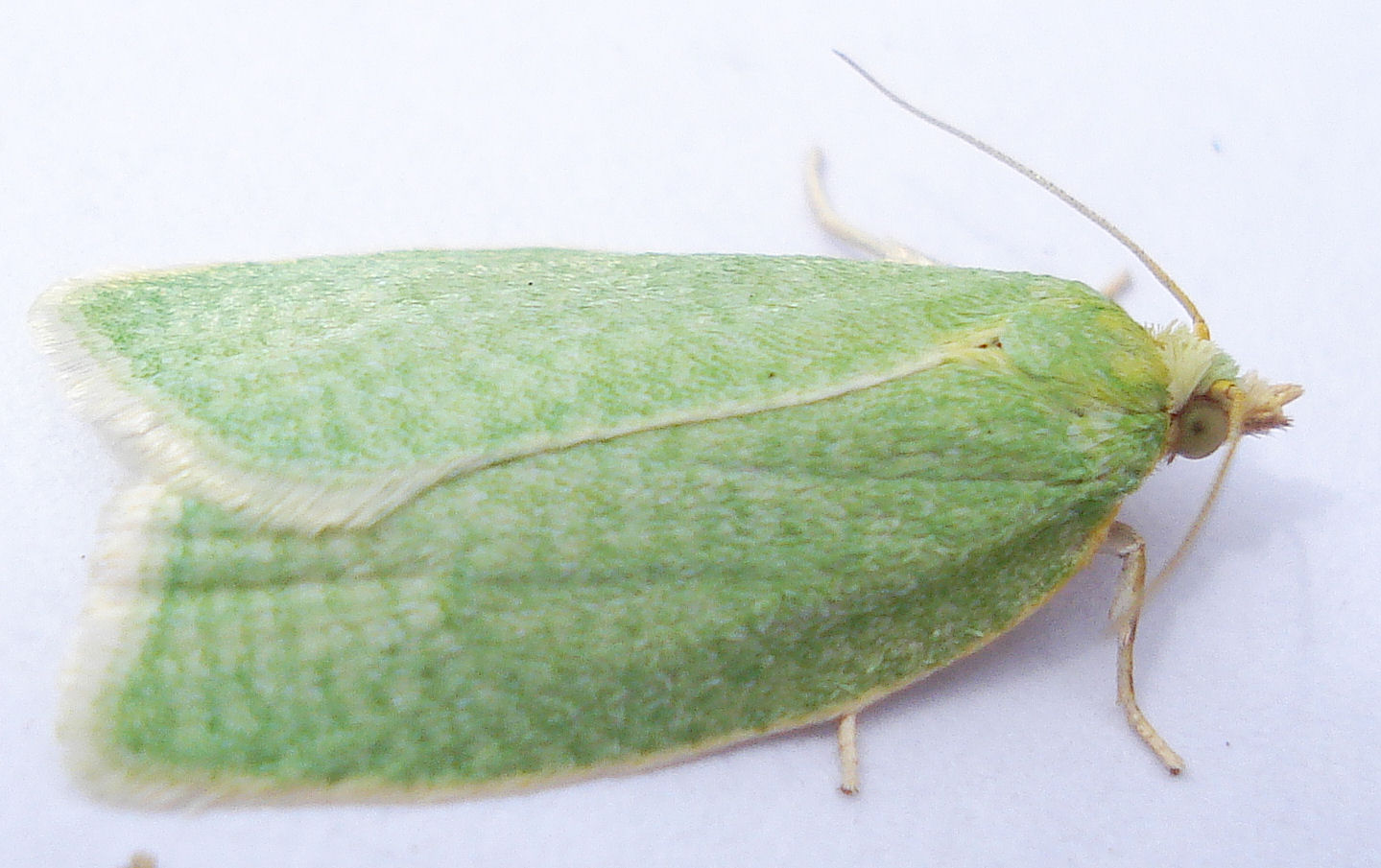 Tortrix viridana